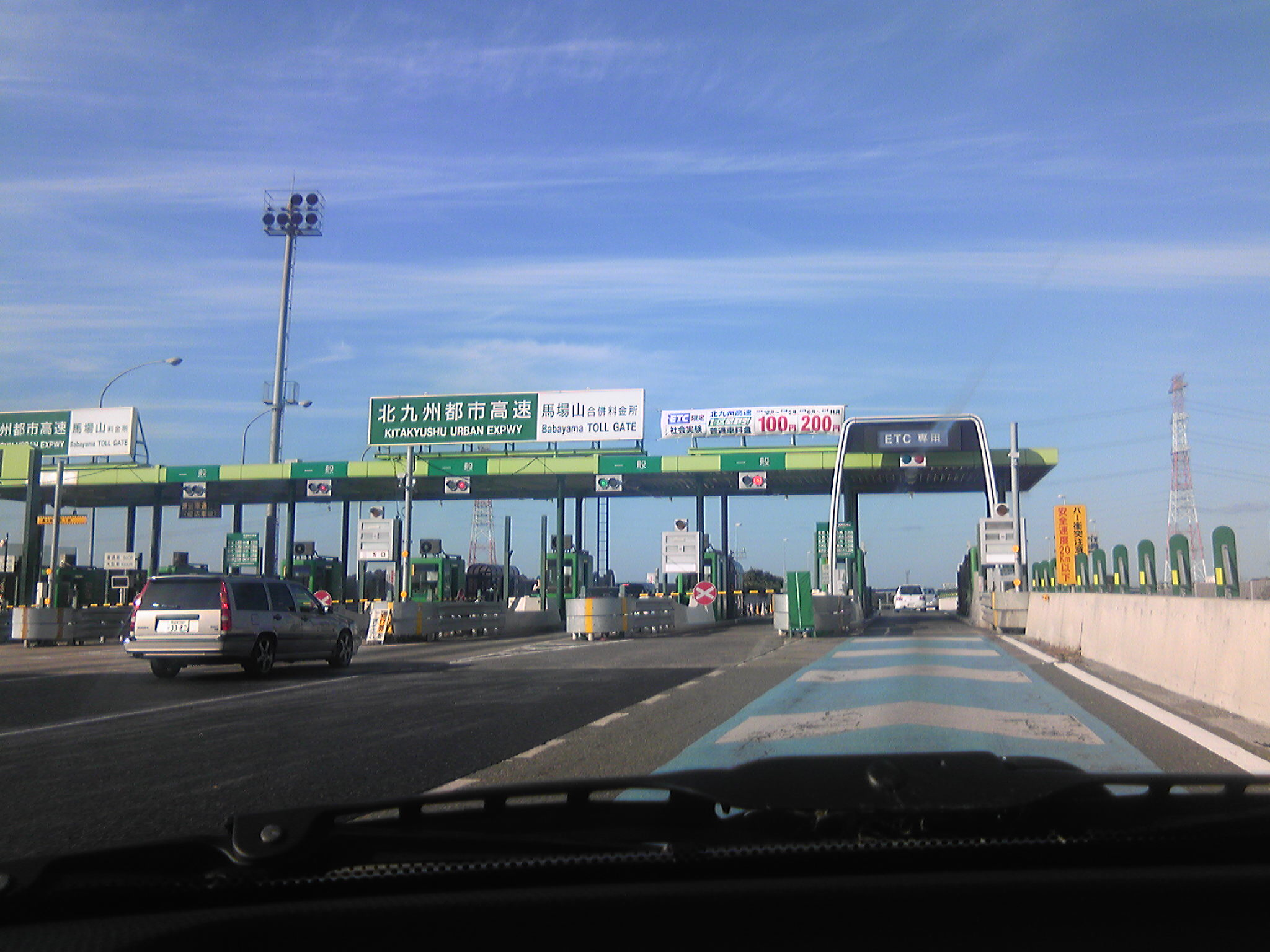 北九州高速道路 馬場山料金所（本線側・福岡県北九州市八幡西区）